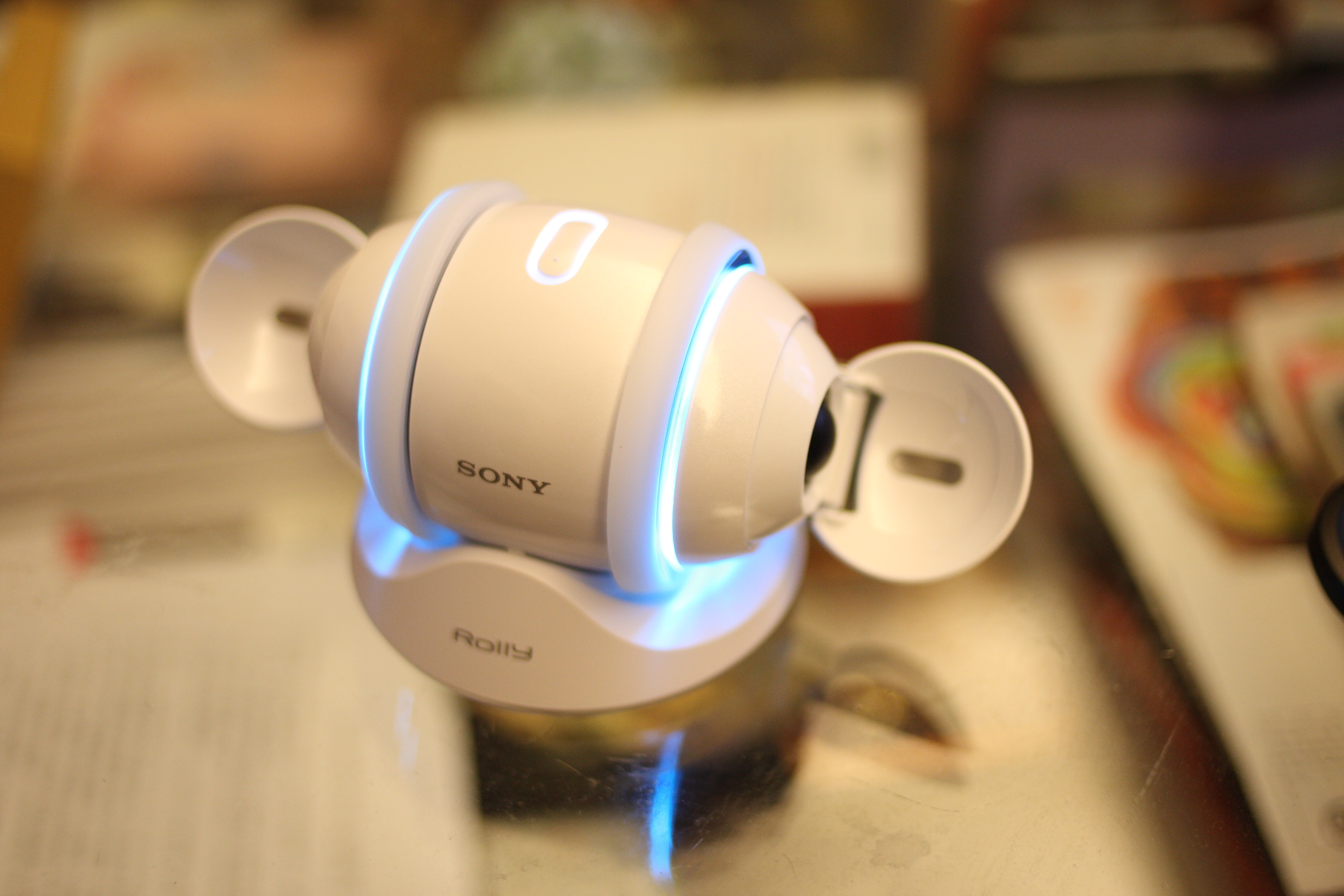 一個很會Rolly的喇叭，很久沒買這麼純種的Sony產品了